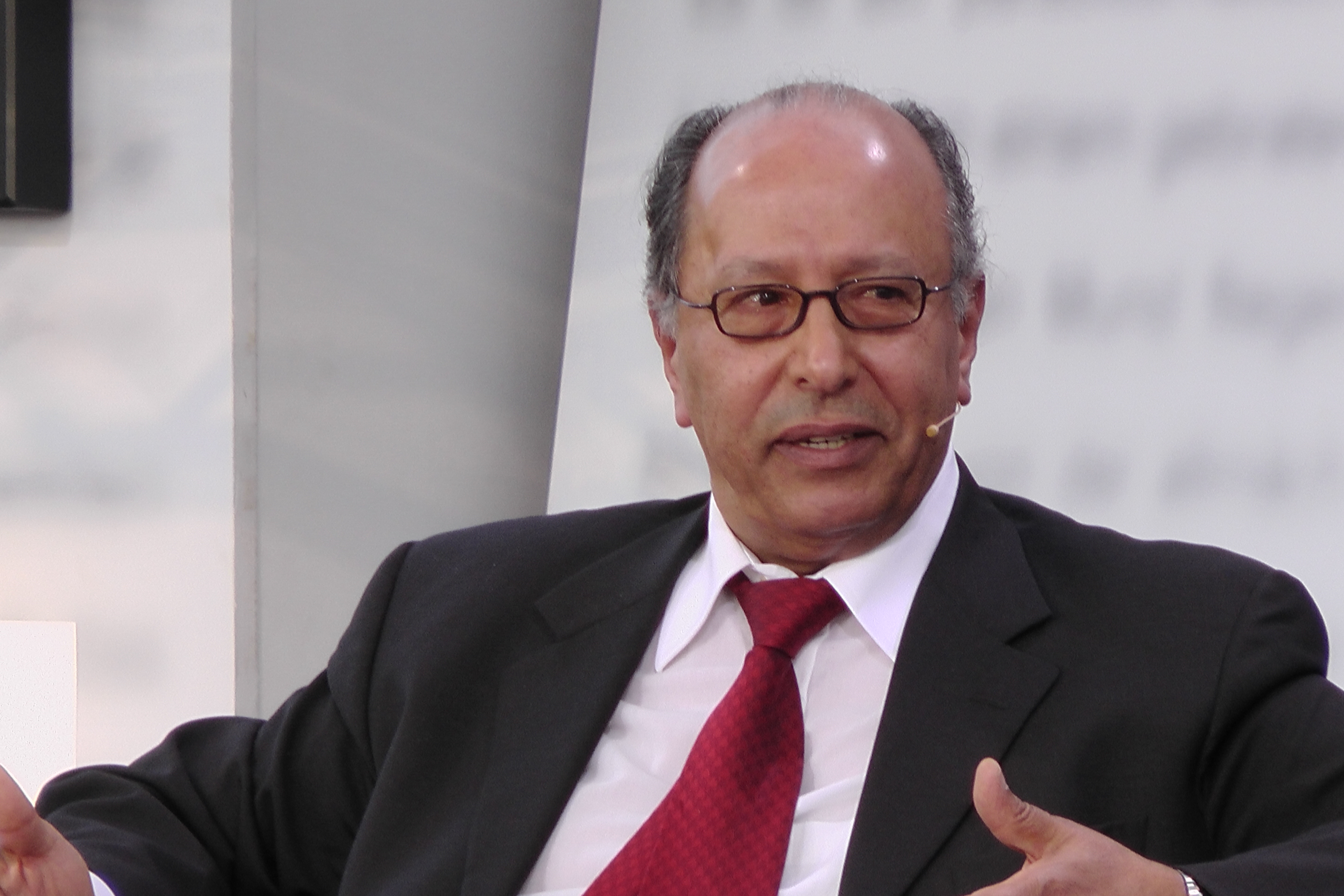 Dieses Fotos dürfen Sie honorarfrei nutzen, wenn Sie folgenden credit beachten: Copyright: Das blaue Sofa / Club Bertelsmann. Frangi, Abdallah: Der Gesandte Heyne Verlag | Moderation: Carl-Ludwig Paeschke Abdallah Frangi wuchs in einer einflussreichen Beduinenfamilie auf, seine Familie wurde aus dem jungen Staat Israel nach Gaza vertrieben. Als die Israelis Gaza besetzten, gehörte Frangis ältester Bruder zu den Gründern der Freiheitsbewegung „Fatah“. Während seines Studiums in Deutschland setzte sich Frangi für einen unabhängigen Staat Palästina ein. Ab 1974 war er offizieller Vertreter der PLO in Deutschland bis Palästinenser bei der Münchner Olympiade 1976 auf israelische Sportler ein Attentat verübten. Frangi wurde aus Deutschland ausgewiesen, stand auf der Todesliste des Mossads, entging einem Attentat und erlebte, wie viele seiner politischen Mitstreiter ermordet werden. Von 1993 bis 2005 war er Generaldelegierter Palästinas in Bonn und Berlin, von 2007 bis 2009 außenpolitischer Sprecher der Fatah. Der persönliche Berater von Präsident Abbas tritt bis heute für eine friedliche Lösung des Nahost-Konflikts ein. Abdallah Frangi, 1943 in Beerscheba, Palästina geboren, studierte Medizin und Politik in Frankfurt. Seit über 40 Jahren engagiert Frangi sich in Deutschland für palästinensische Politik.